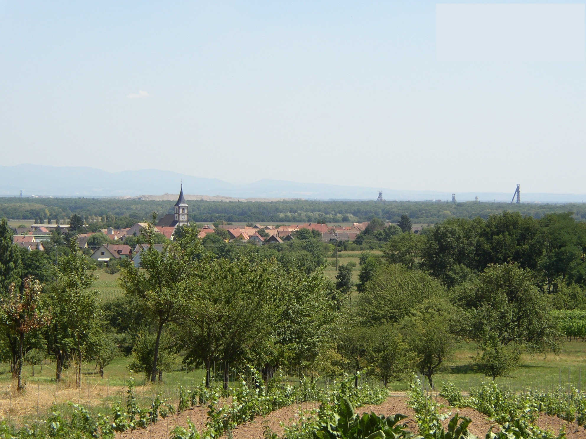 Vue sur le village